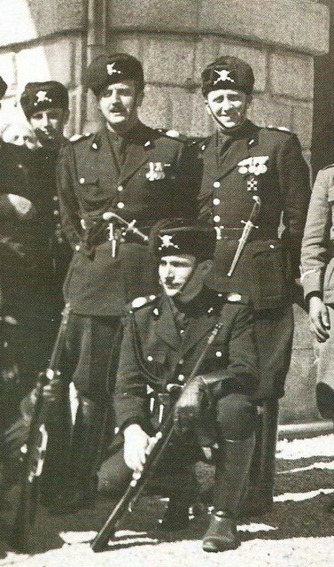 Moschettieri del Duce, MVSN (in una foto tratta dal forum di MILITES)